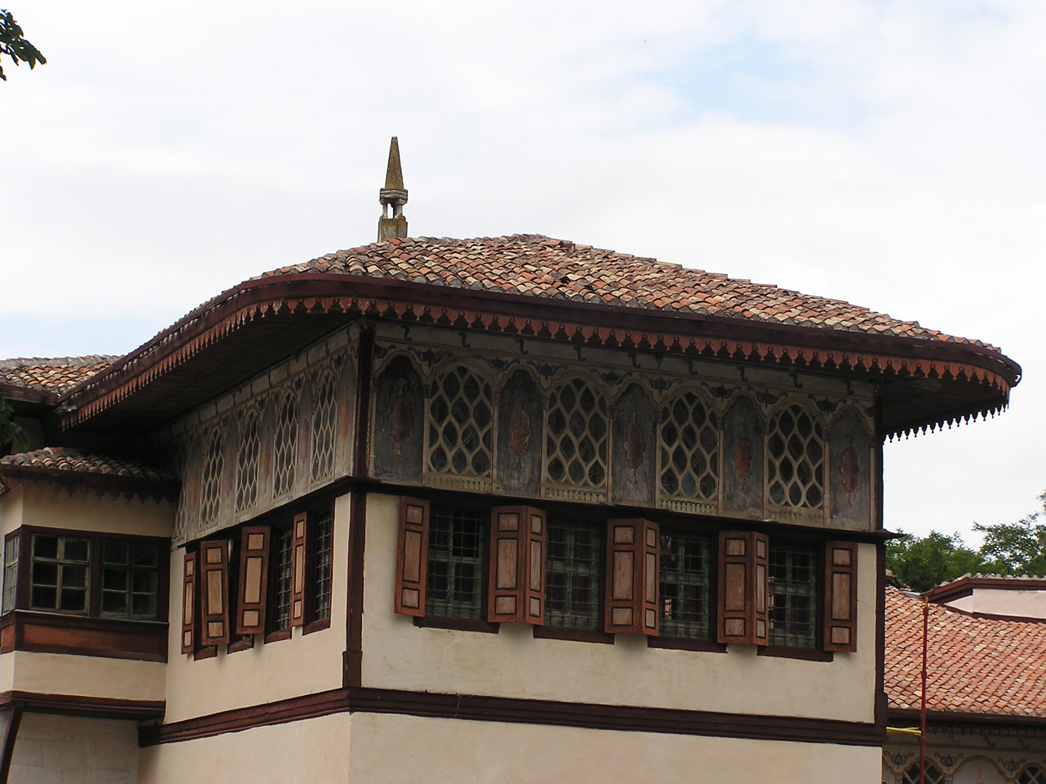 Бахчисарайский дворец